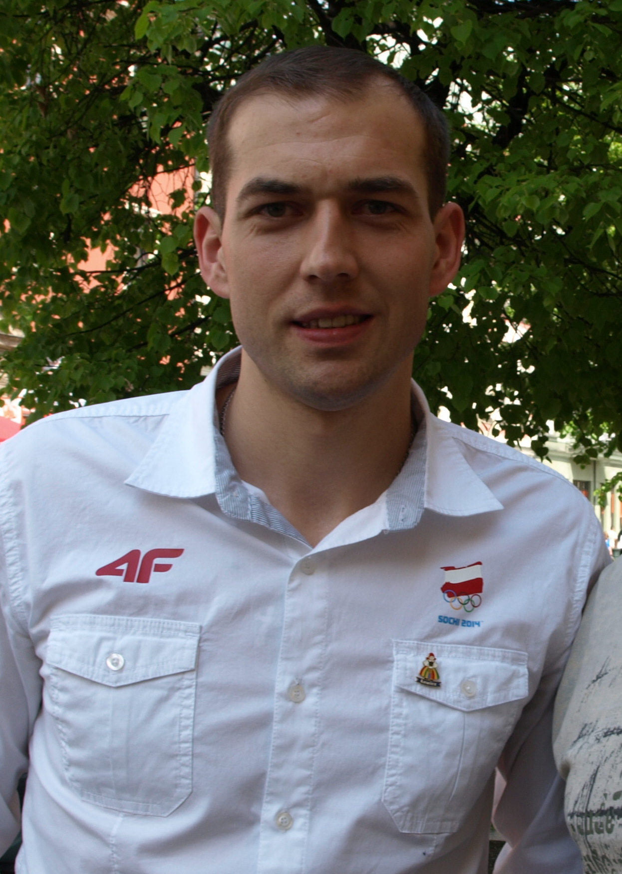 Zbigniew Bródka